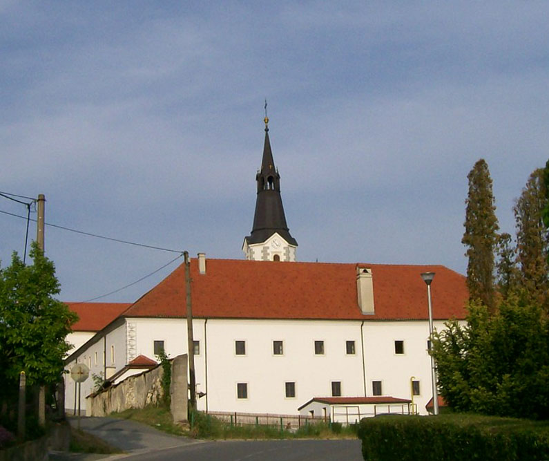 Franjevački samostan s crkvom Navještenja Blažene Djevice Marije u Klanjcu